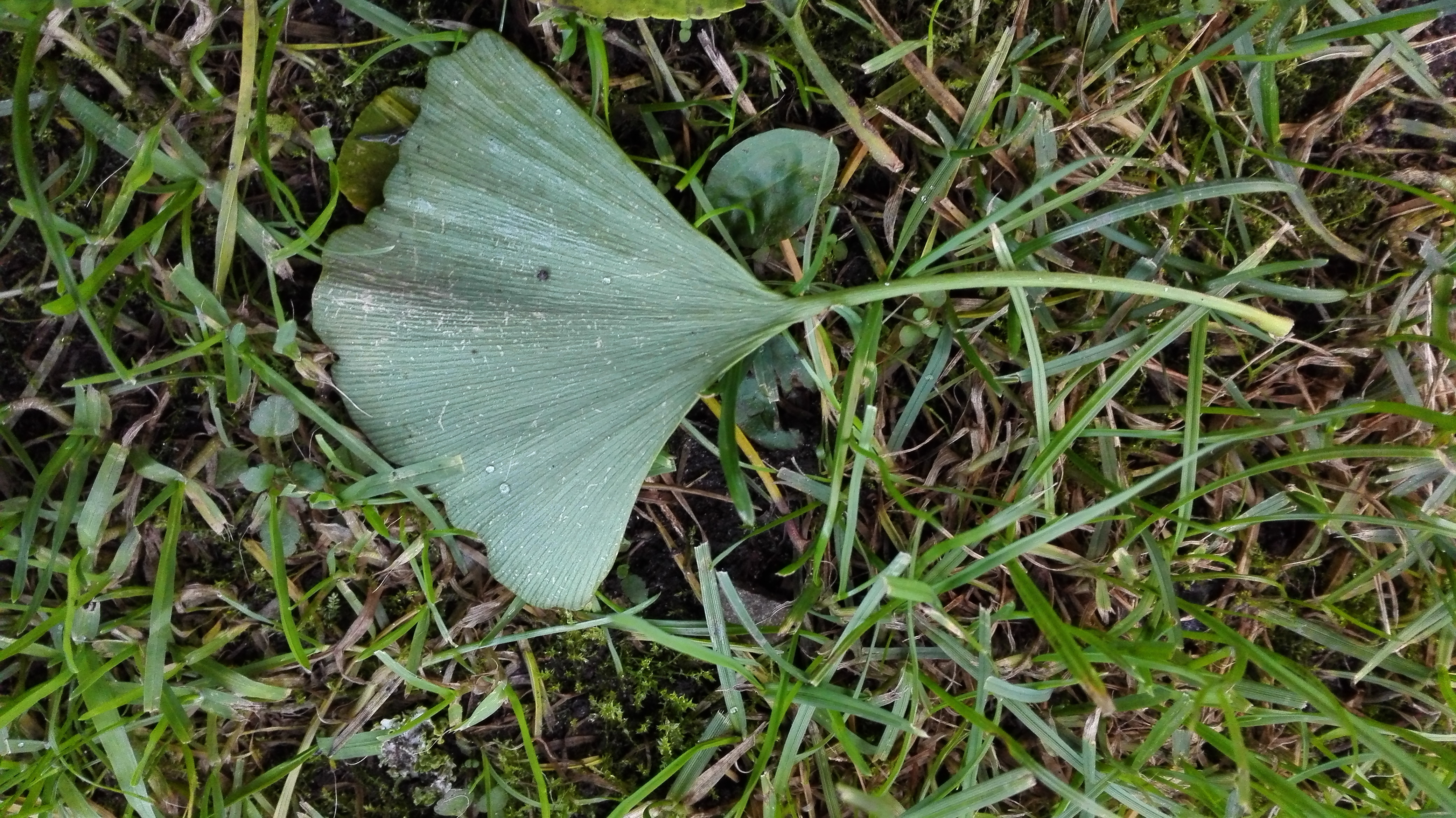 Wilhelminapark, Tilburg: gevallen blad van de enige Gingkgo biloba in het park. Plantjaar 1950. Bladvorm zeer ongewoon, als een eendenpoot, vandaar de Nederlandse naam eendenpootboom.